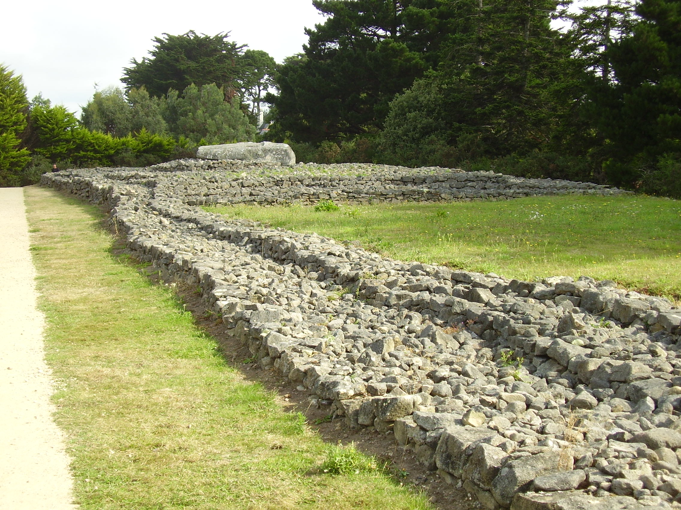 Locmariaquer, Frankreich